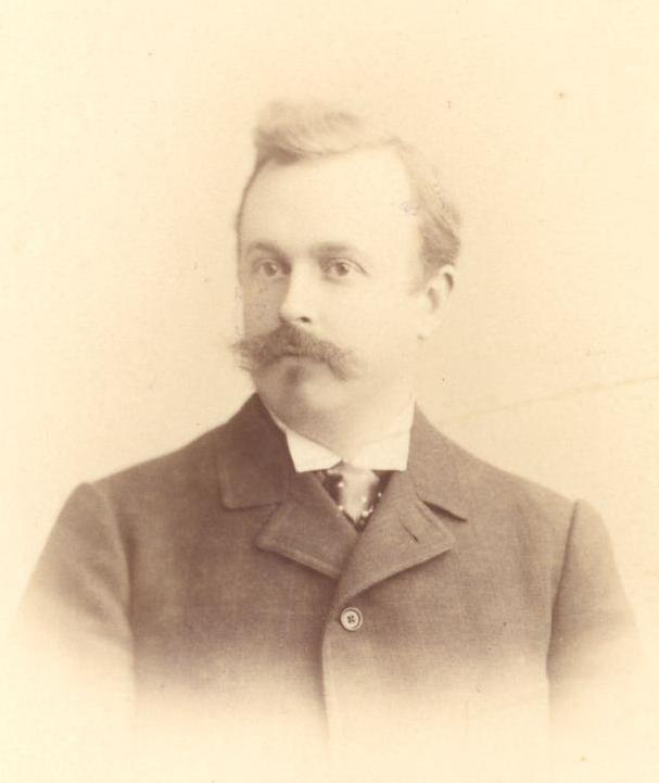 Alexandre Maurice Dior (1872 - 1946)